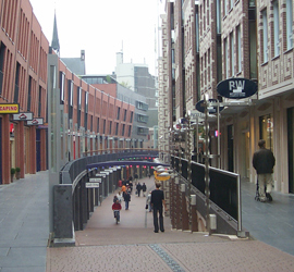 Eigen foto van dit nieuwe gedeelte in de Nijmeegse binnenstad in 1998 Categorie:Afbeelding Nijmegen